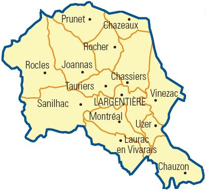 Carte détaillée des communes du canton (Ardèche)